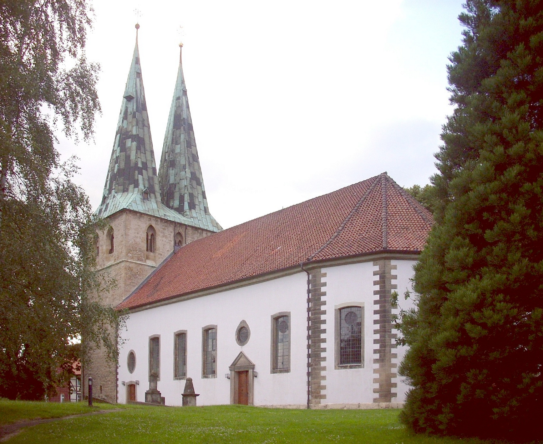 Ev. Kirche St. Laurentius, Hohenhameln, Germany